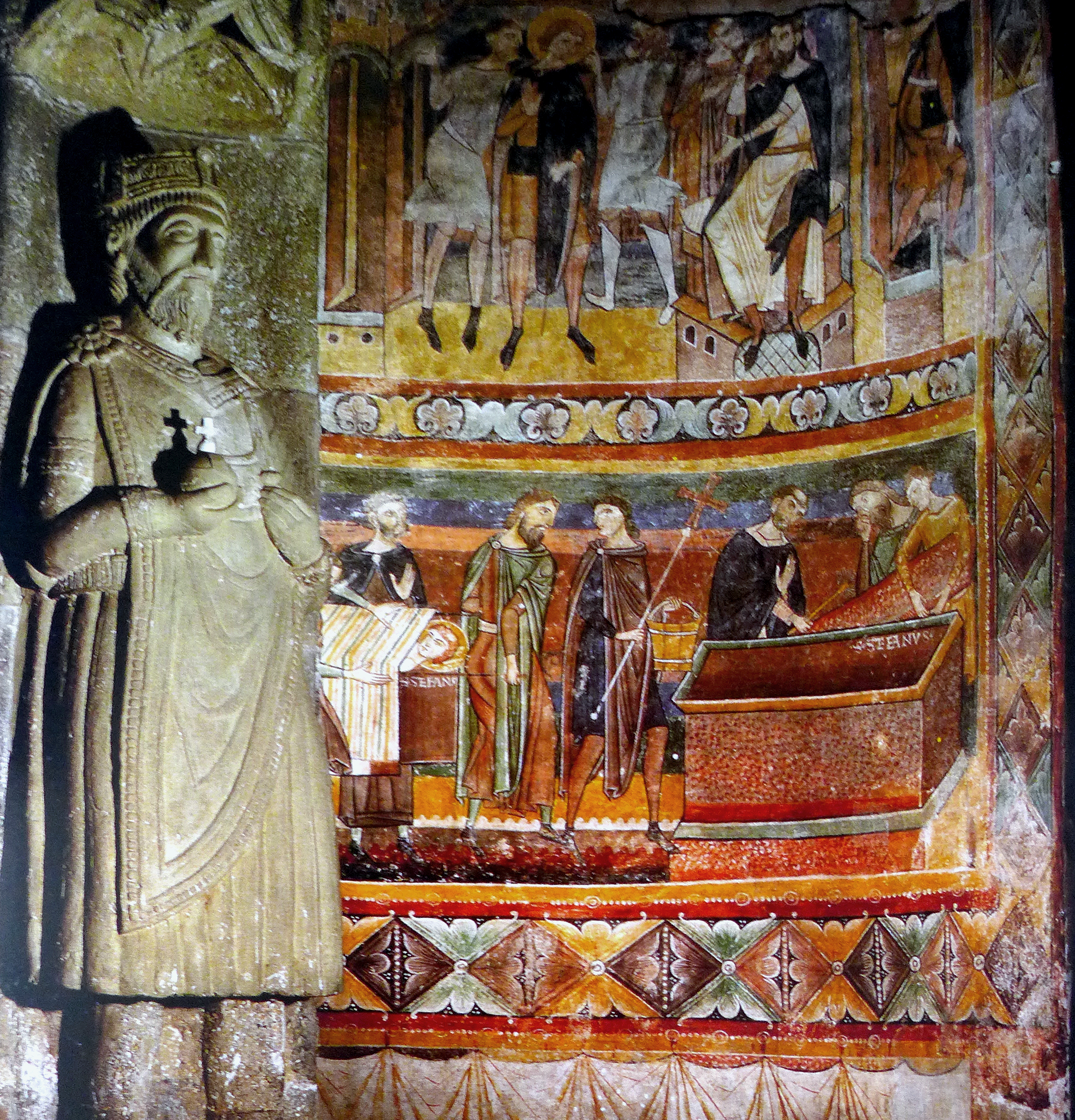 A Szent János apátsági kolostortemplom Karoling-kori freskói, az előtérben Nagy Károly szobrával (Müstair, Svájc)